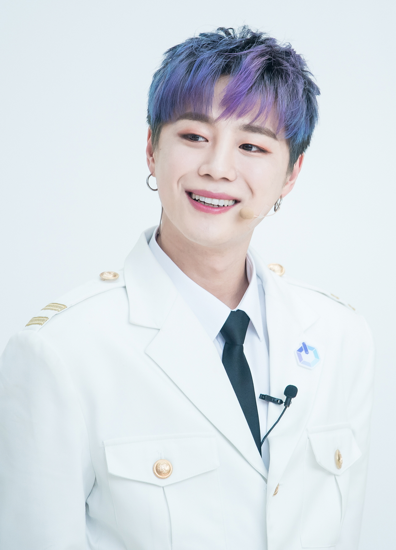 180211 더유닛 유닛B